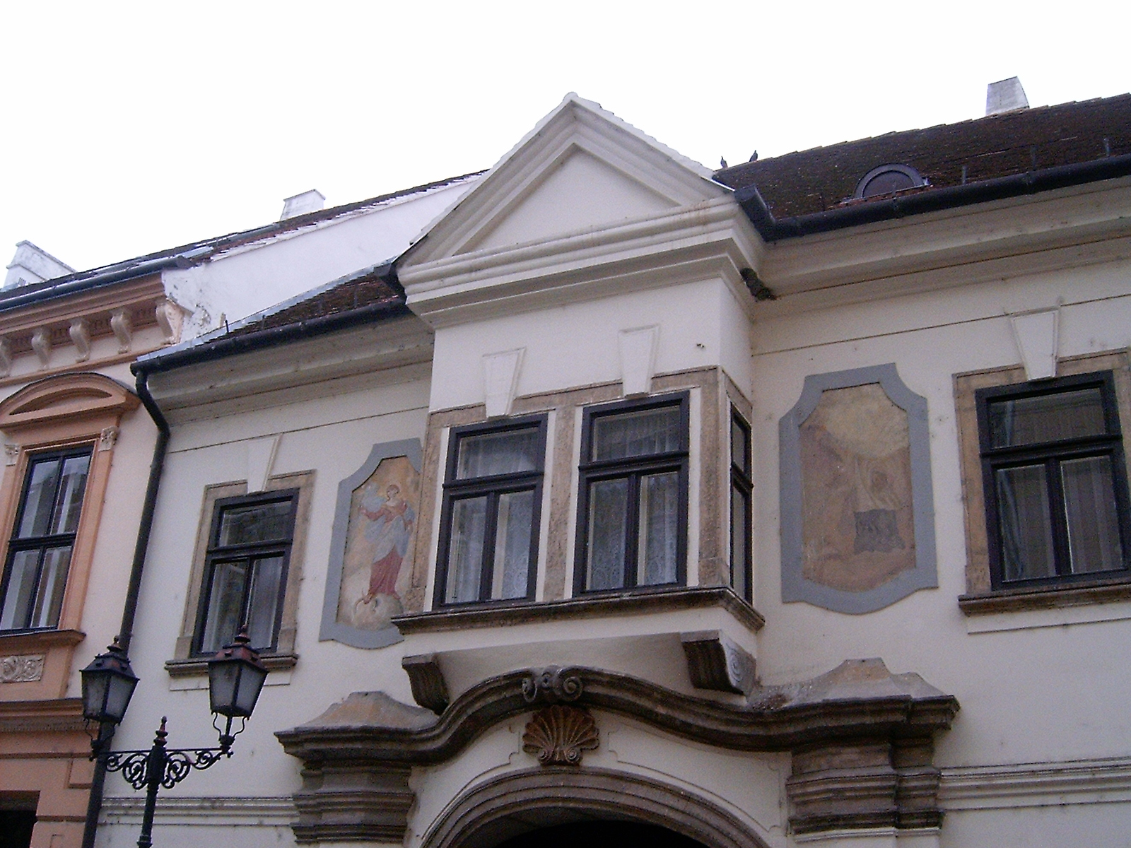 A győri Liszt Ferenc utca 22. barokk lakóház, saját kép